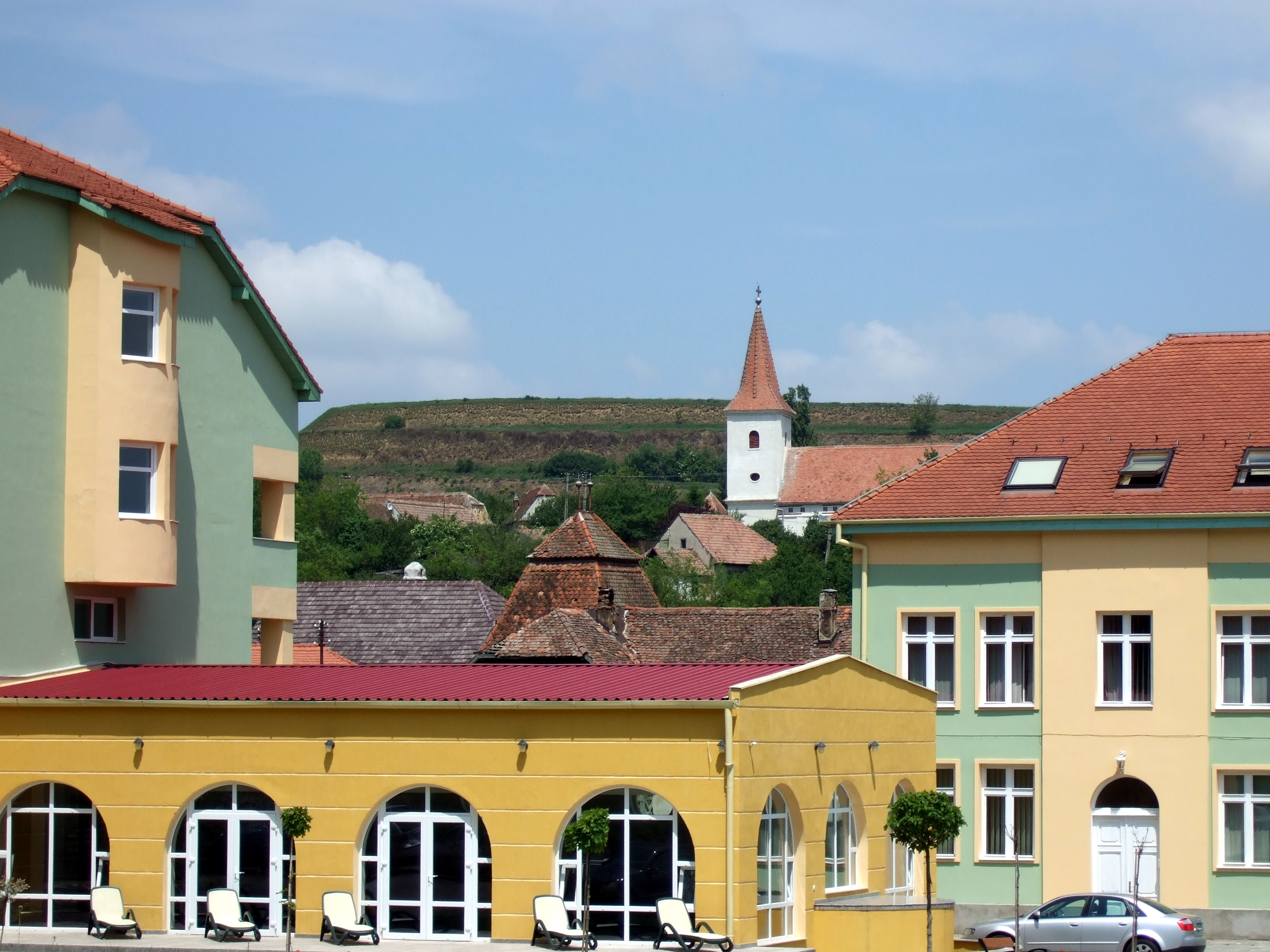 la station balnéaire